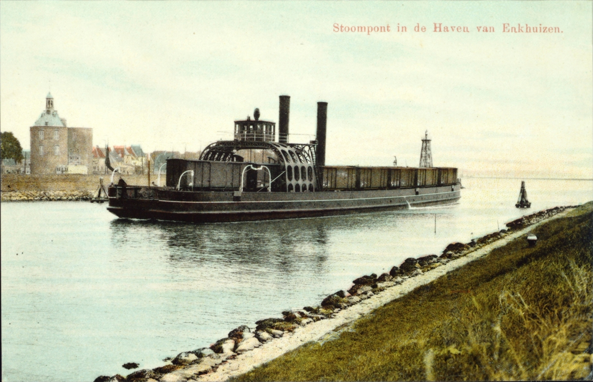 Aankomst van de stoomveerpont van het treinveer Enkhuizen-Stavoren